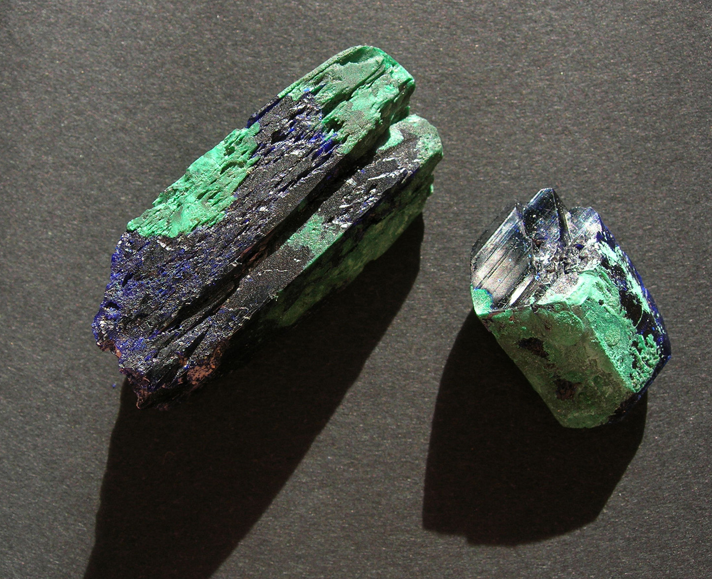 Cristaux d'azurite en partie recouverts de malachite.(Longueur du plus grand:3,5 cm)